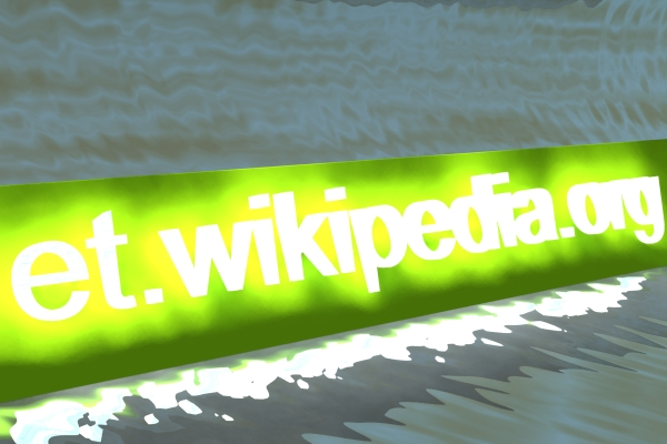 Teksti materjal valgustuse rollis